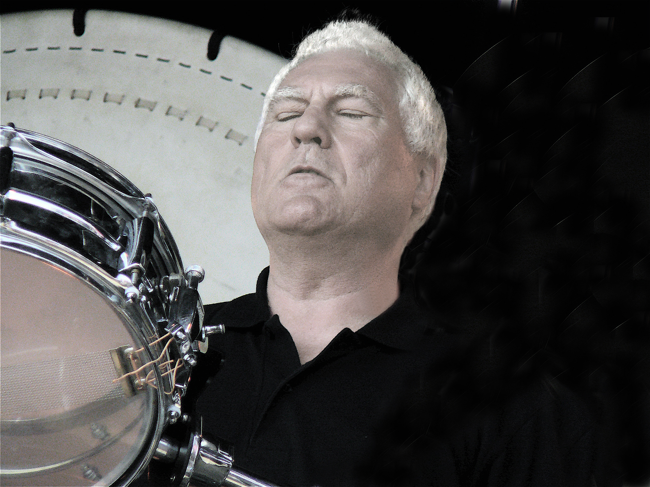 Transvaal 22-6-2008 Gastoptreden van Cesar Zuiderwijk. werelddrummer van de Golden Earring samen met de percussieband Percossa in het wijkpark Cesar Zuiderwijk